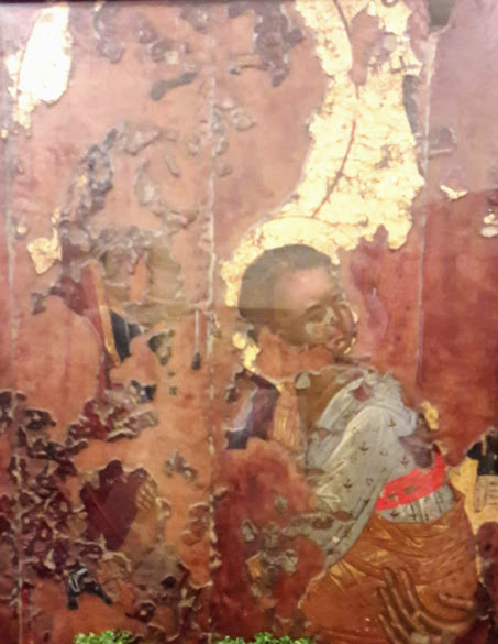 Εικόνα της δεκαετίας του 1630